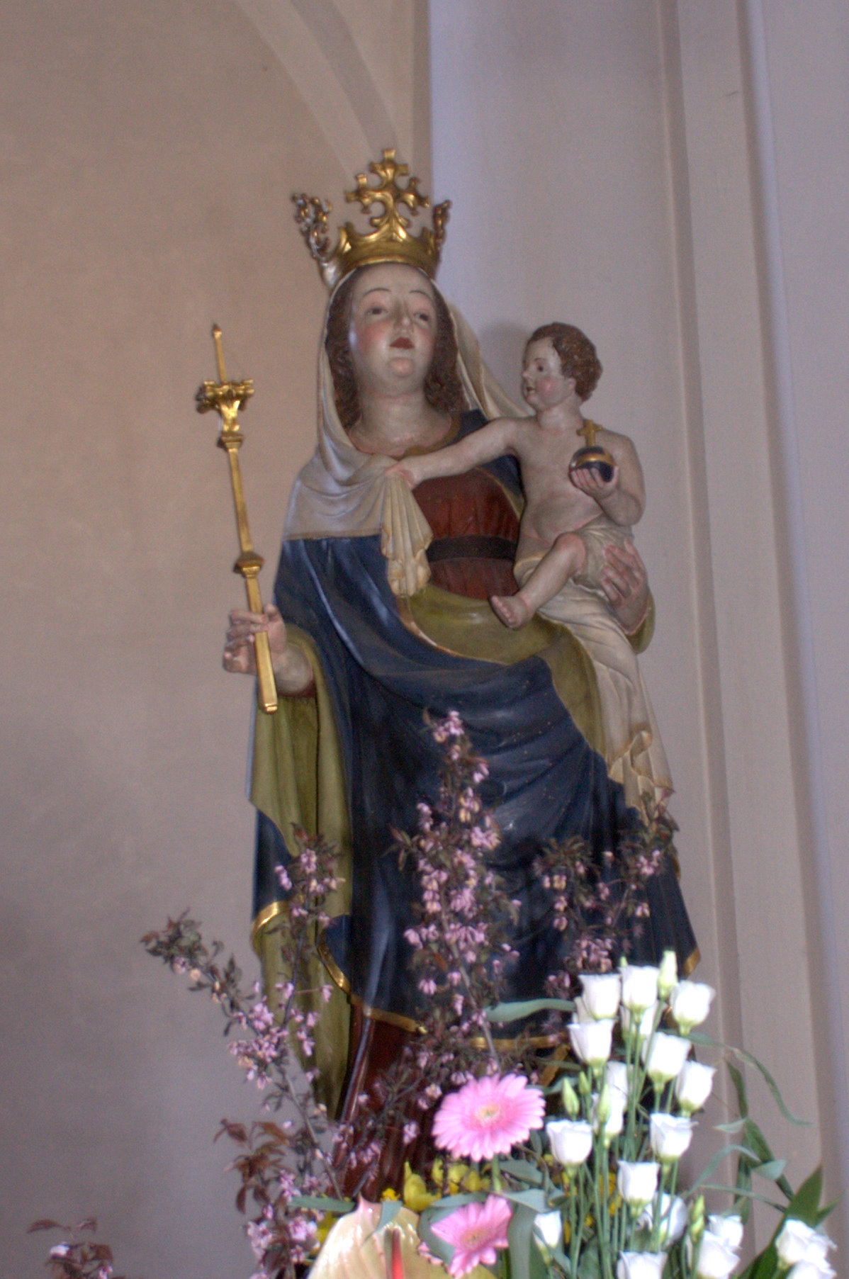 Autobahnkirche Dolina, Maria-im-Walde-Kirche Madonna mit Kind